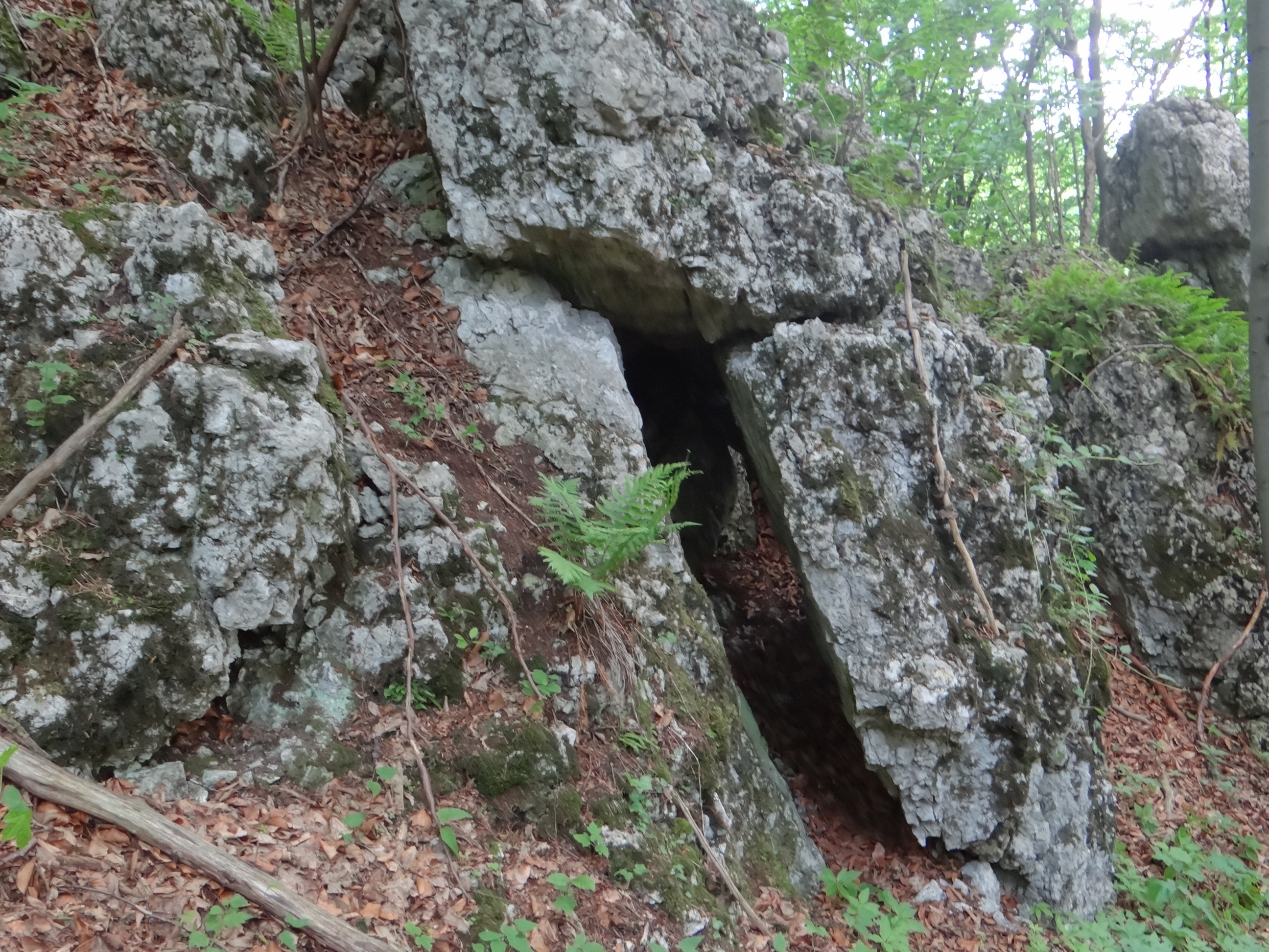 Szczelina w Krętych Skałach II w Kozłowych Skałach w Dolinie Szklarki